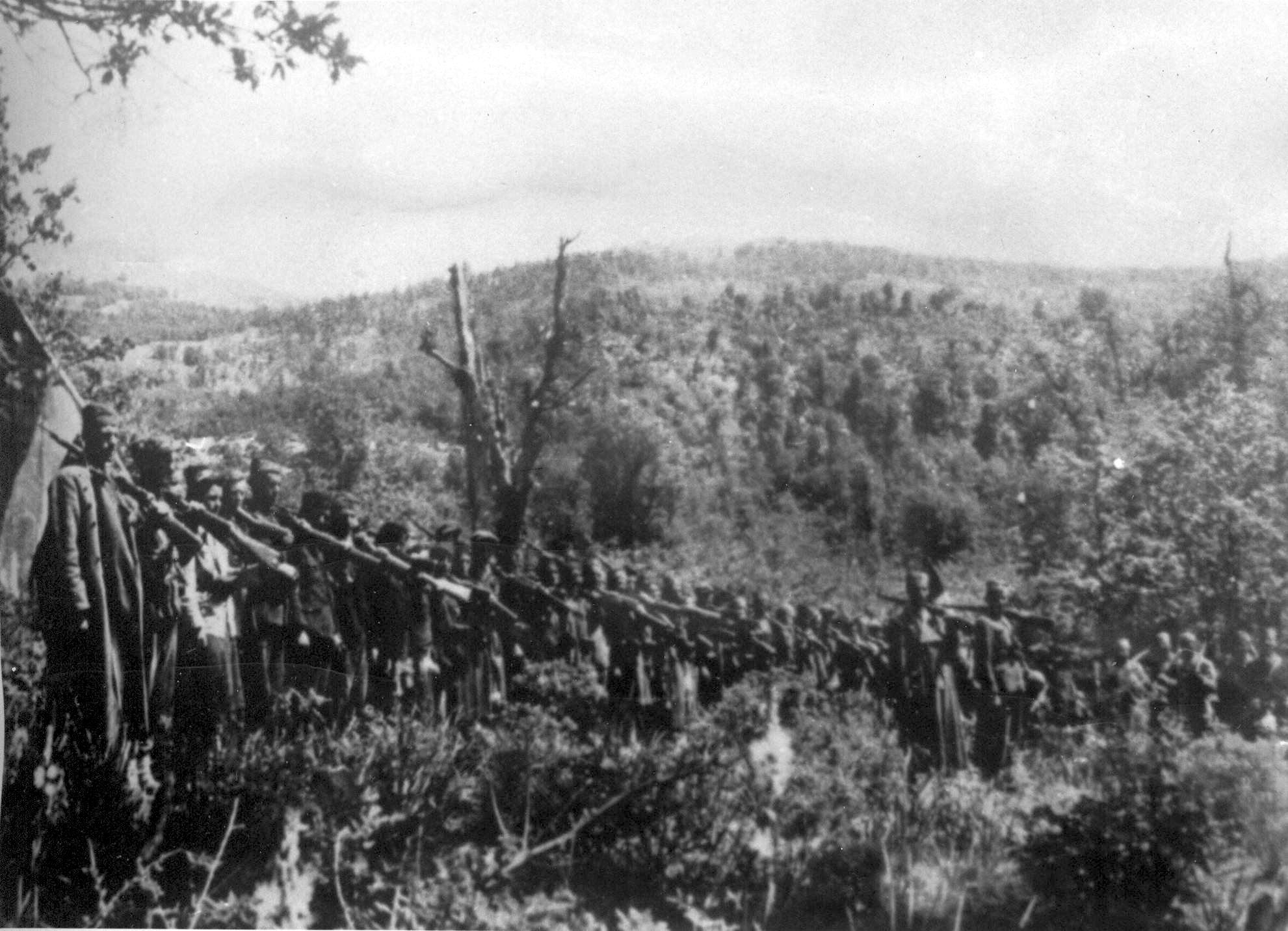 Srpskohrvatski / српскохрватски: Borci Zetskog partizanskog odreda